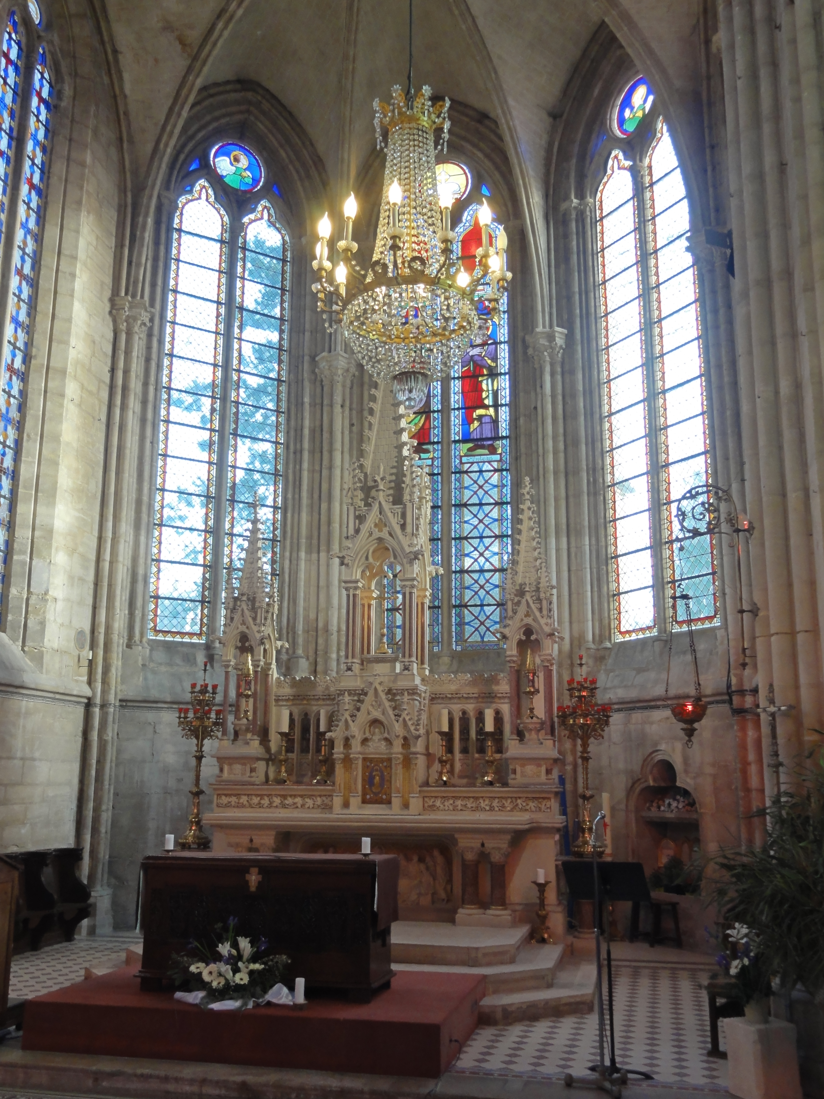 Abside.